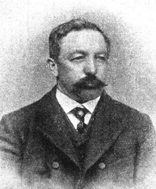 Österreichischer Politiker, Reichsratswahl 1907, Name siehe Dateiname